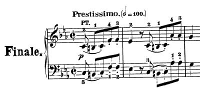 Compassos iniciais do terceiro movimento da Sonata Op. 10 nº 1 de Beethoven